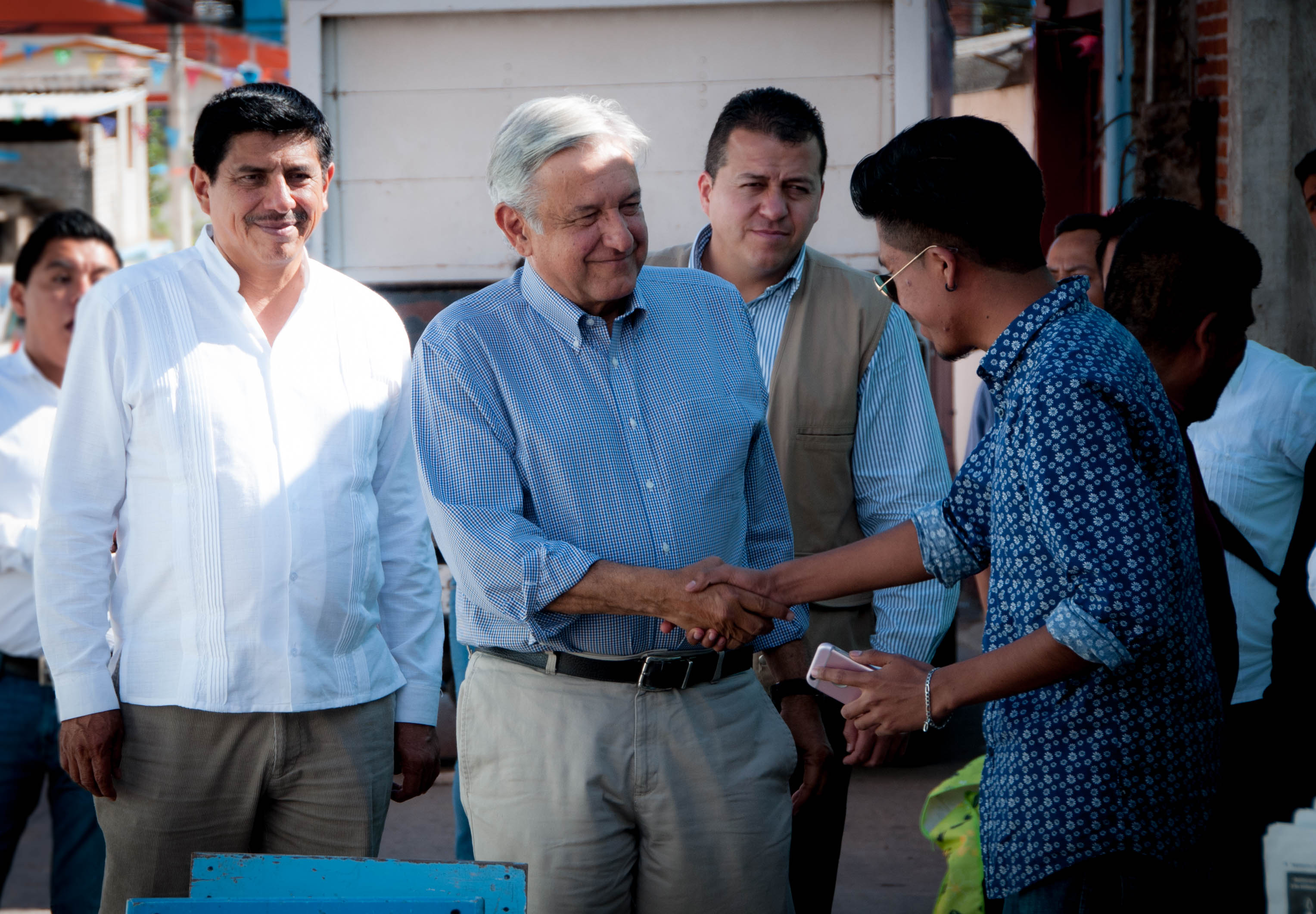 Visita de Salomón Jara y Andrés Manuel López Obrador a San Baltazar Chichicapam Oaxaca